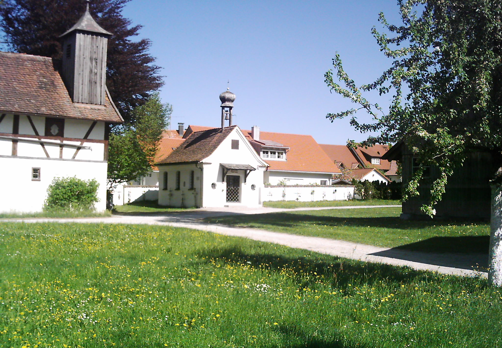 Kapelle Hettisried, im Schwäbischen Bauernhofmuseum Illerbeuren